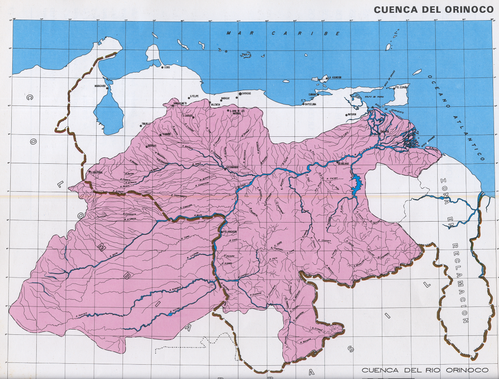 Mapa de la Cuenca del Orinoco. Tomado de la obra El Orinoco aprovechado y recorrido de Rafael de León y Alberto J. Rodríguez Díaz. Editado conjuntamente por el Ministerio de Obras Públicas y la Corporación Venezolana de Guayana (uncopyrighted edition). Caracas, 1976. Esta obra forma parte de los documentos generados por el Grupo de Trabajo para los Estudios del Río Orinoco (Proyecto Orinoco) dirigido por el Ingeniero Alberto J. Rodríguez Díaz.